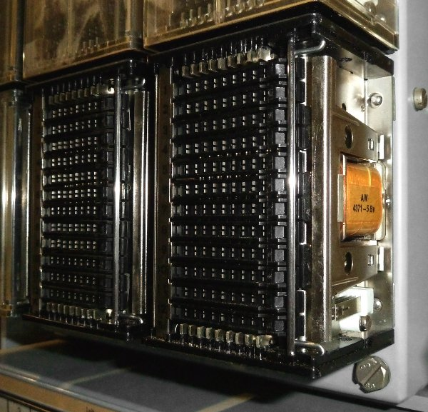 Das Bild zeigt einen Ausschnitt aus dem Gestell von der Wählsterneinrichtung 63a in der Vermittlungsstelle mit dem Ordinatenhaftschalter (OHS).